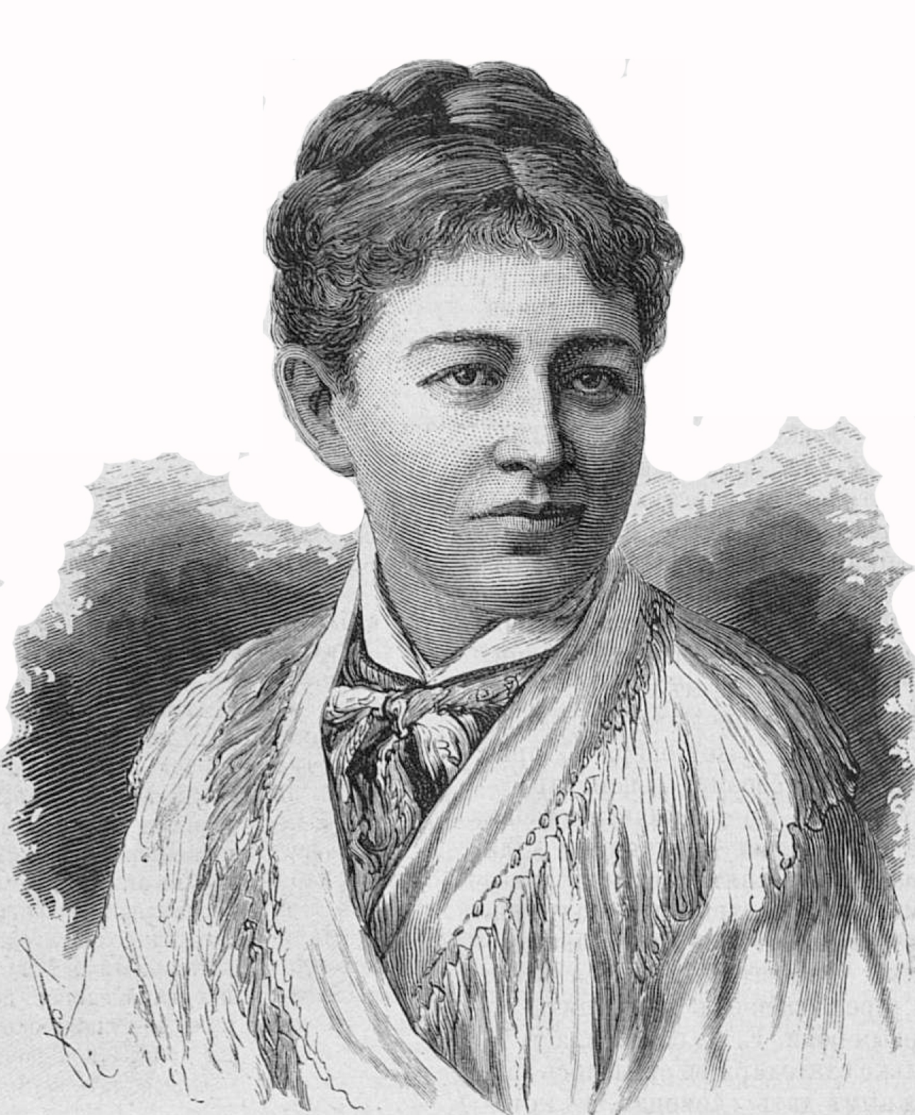 Люценко Любовь Николаевна, российская оперная певица